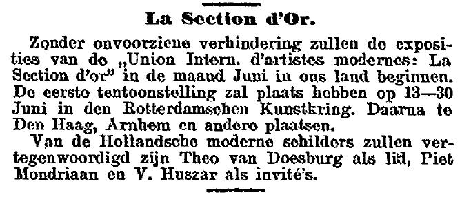 Afomstig uit Nieuwe Rotterdamsche Courant, 12 mei 1920.